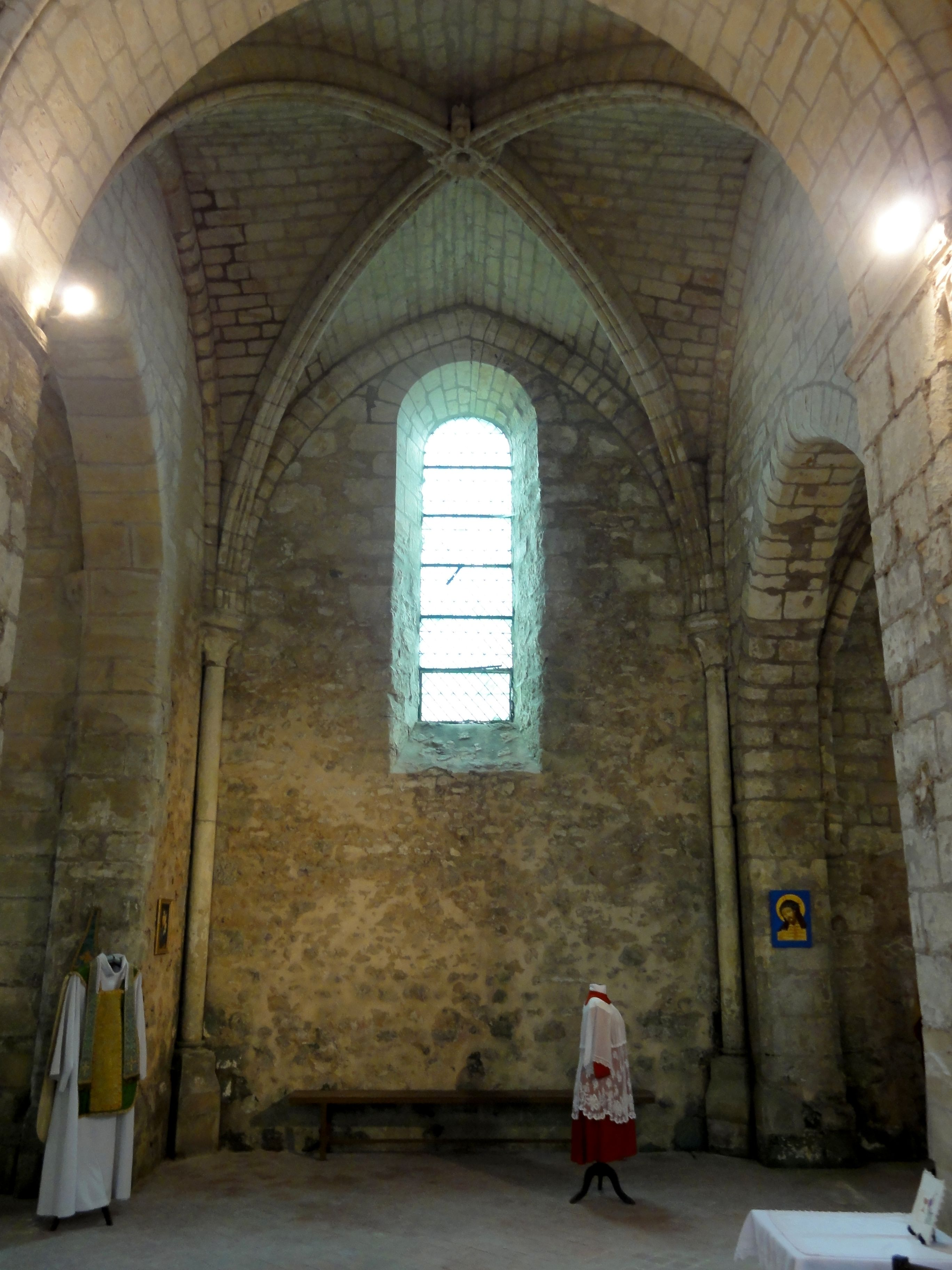 Croisillon nord.